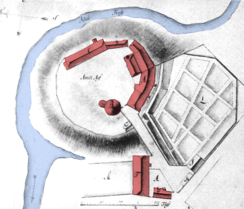 Schloss Dannenberg als Amtshof um 1720, die Gebäude und der Fluss sind nachträglich koloriert